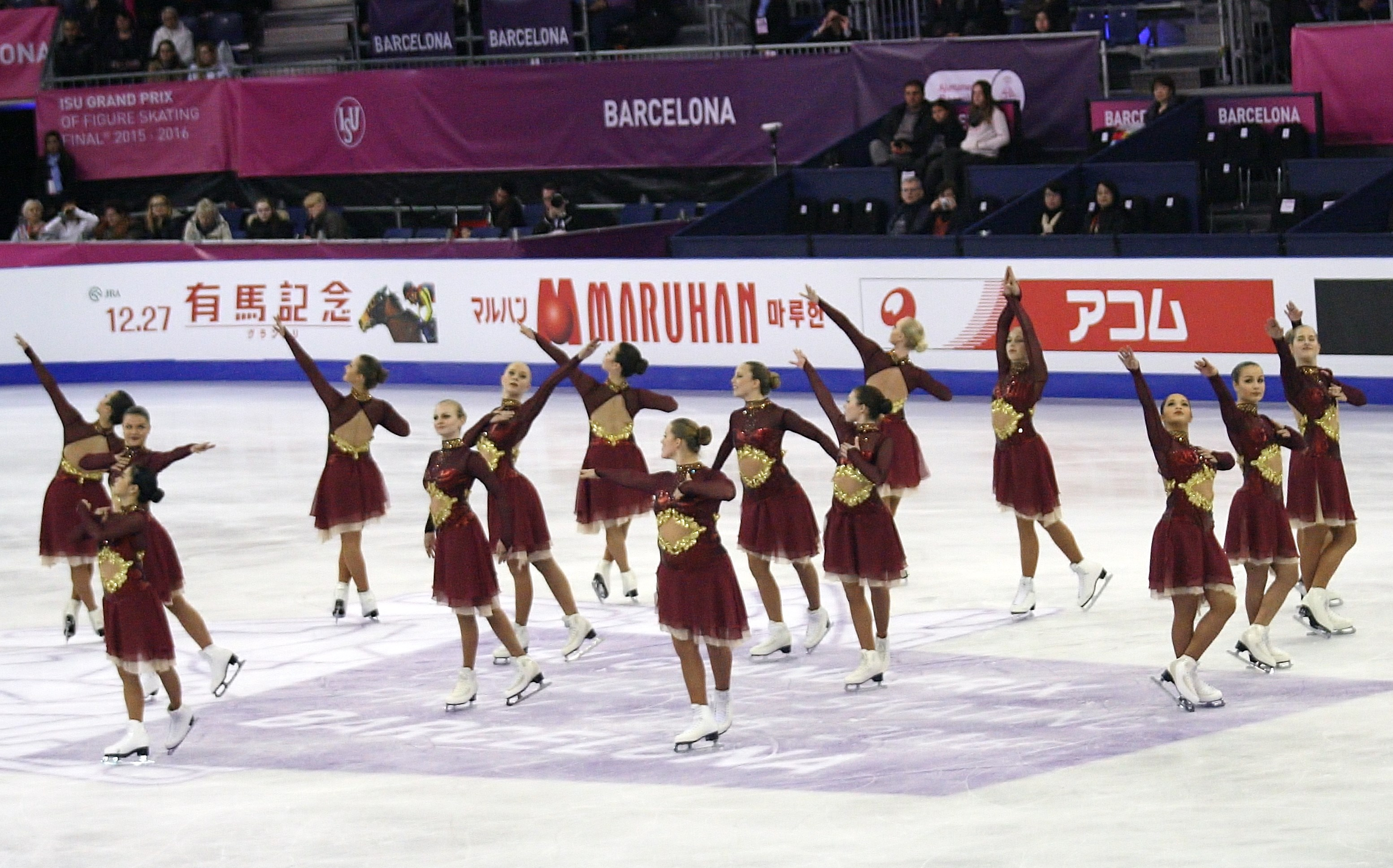 Команда синхронного фигурного катания Suprise (Швеция) на финале Гран-при по фигурному катанию 2015-2016.